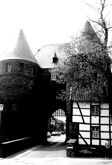 Das Stadttor von Nideggen (Dürener Tor, Feldseite)